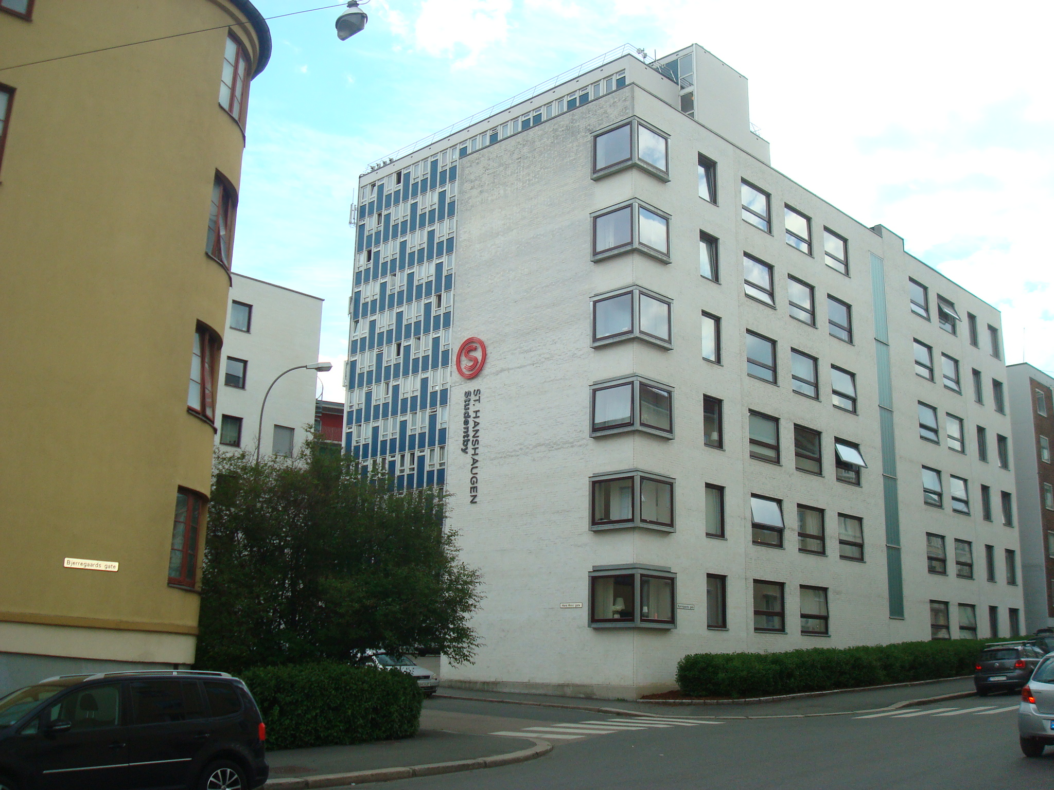 St. Hanshaugen studentby i Oslo. Krysset Hans Ross' gate/Bjerregaards gate.